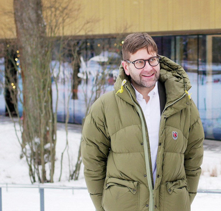 Thomas Olsson